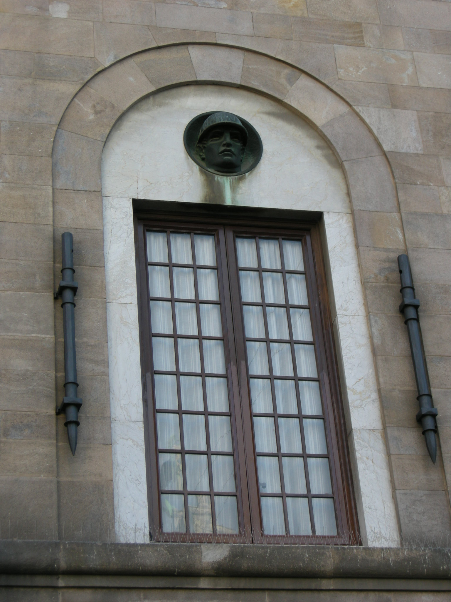 Casa del Mutilato (Lucca) 02